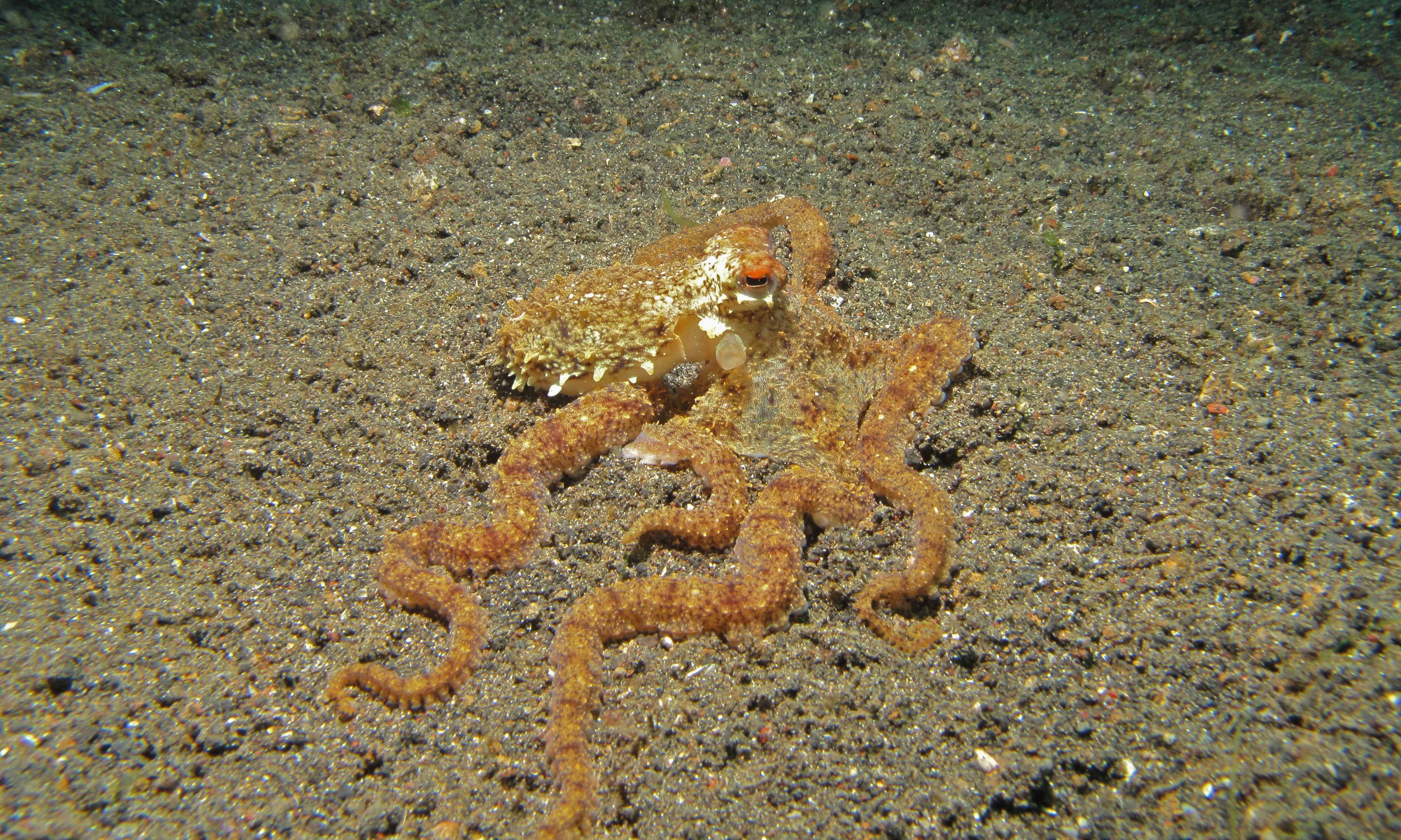 Jahir, Lembeh Strait, Sulawesi, INDONESIA